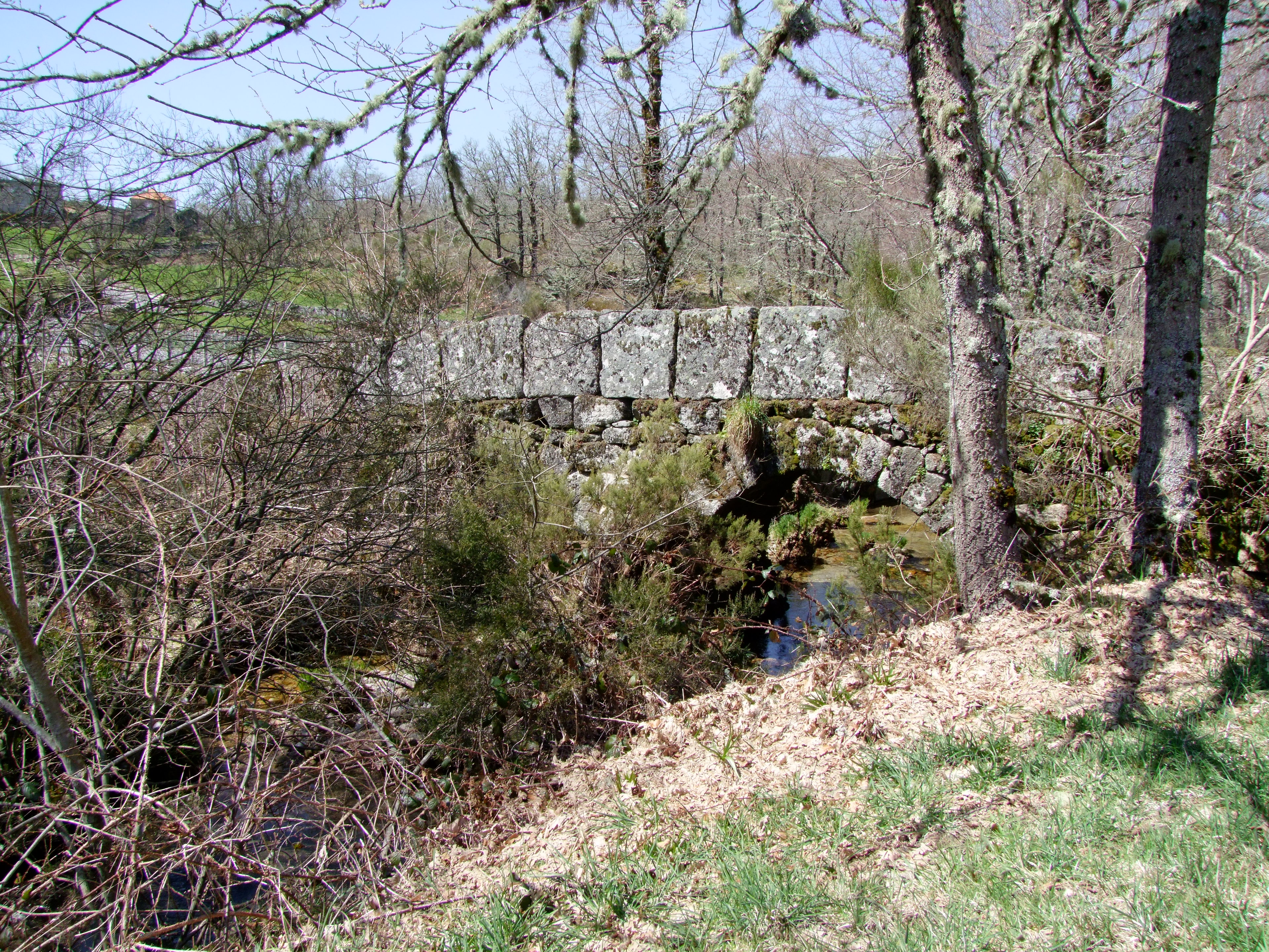 Ponte das Cainheiras. Portugal, Viana do Castelo, Melgaço, Castro Laboreiro, lugar das Cainheiras. This monument is classified as Imóvel de Interesse Público.